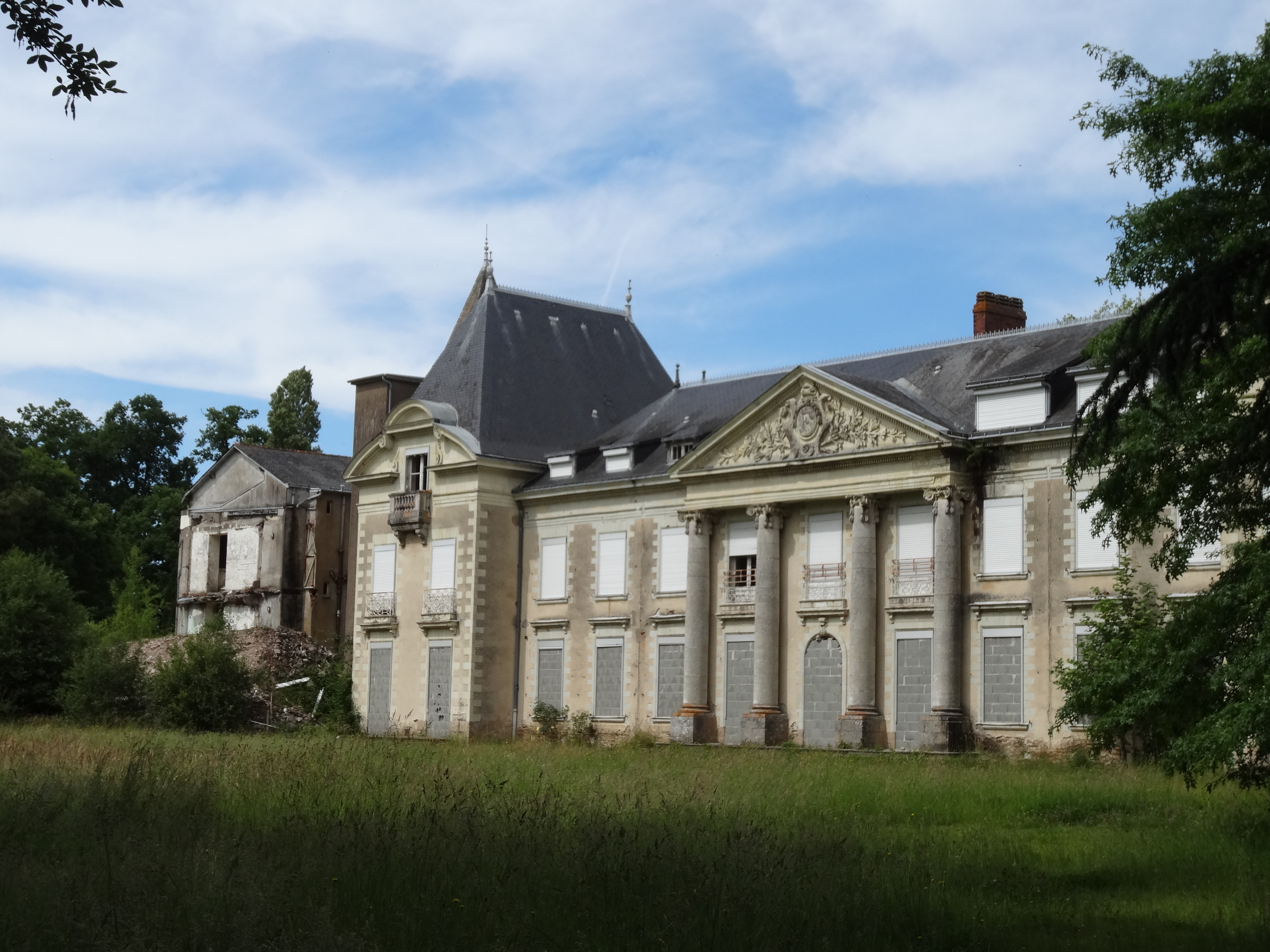 Façade sur jardin du château de la Droitière (Mauves-sur-Loire, Loire-Atlantique, France). Château du XVIIIe siècle où vécut la sœur de Jules Verne. Lui-même y séjourna parfois. Transformé en hospice dans les années 1930, il accueillit ensuite des tuberculeux et une aile de cure fut construite. En 1960, le domaine se transforma en unité normalisée puis fut abandonné en 1990. Entre les vieux en fin de vie et des personnes atteintes d'une maladie incurable dûe à une forme de lèpre tuberculoïde, l'endroit était effrayant.